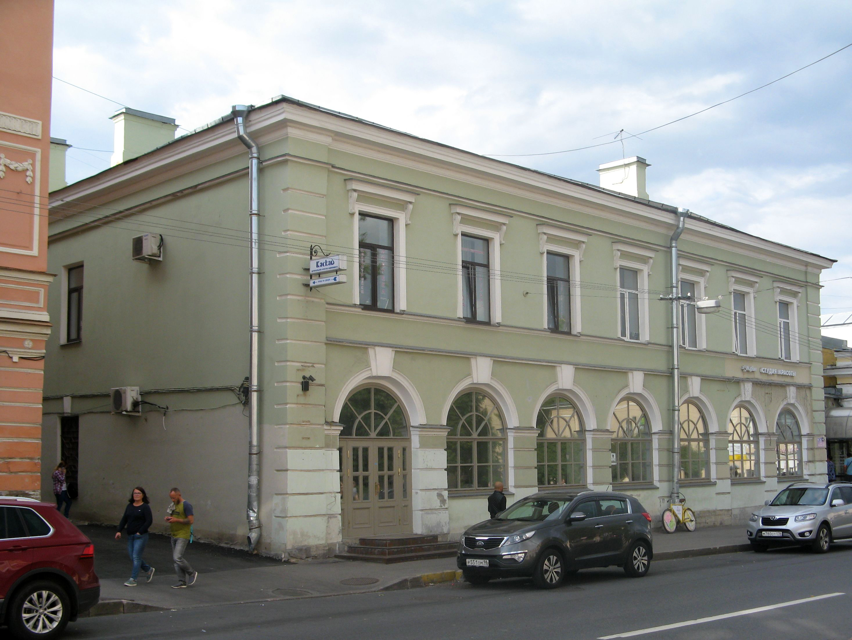 Усадьба Телятниковых: Оранжерейная улица, 16, 20, Пушкин, Пушкинский район, Санкт-Петербург